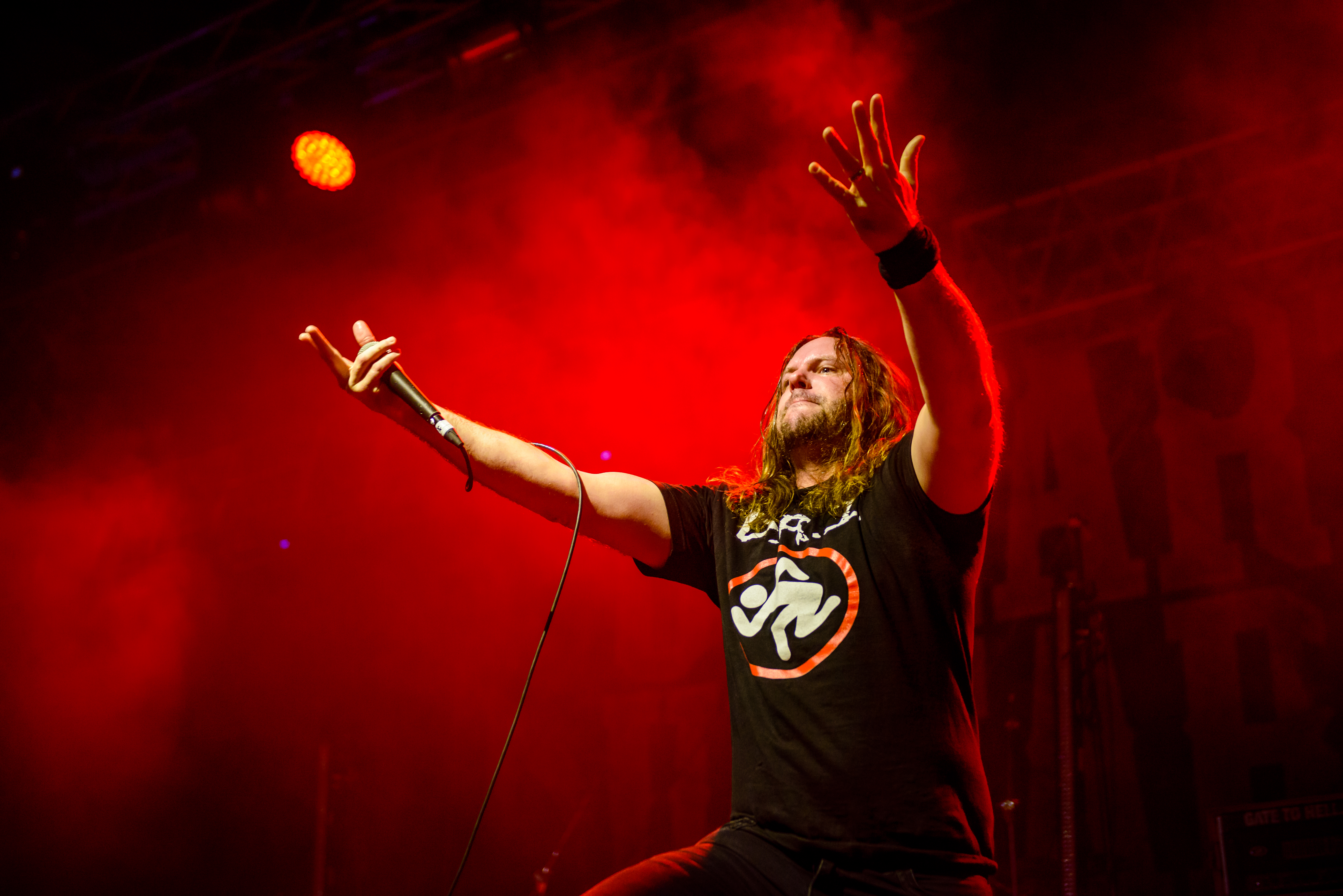 'Ruhrpott Metal Meeting 2016; Oberhausen Turbinenhalle': 'Unearth'